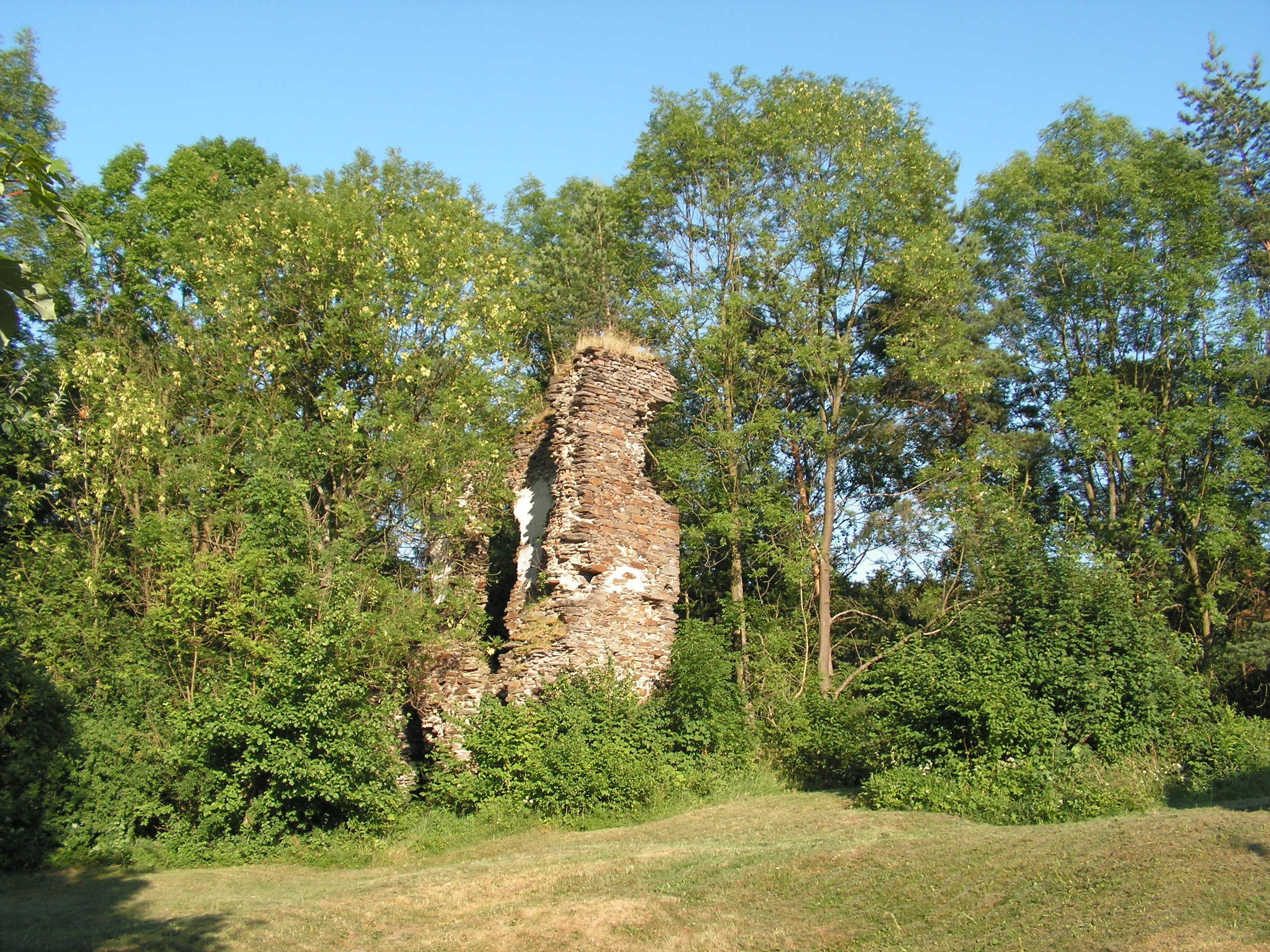 Zřícenina hradu Chlum ve stejnojmenné vsi v okrese Kutná Hora.